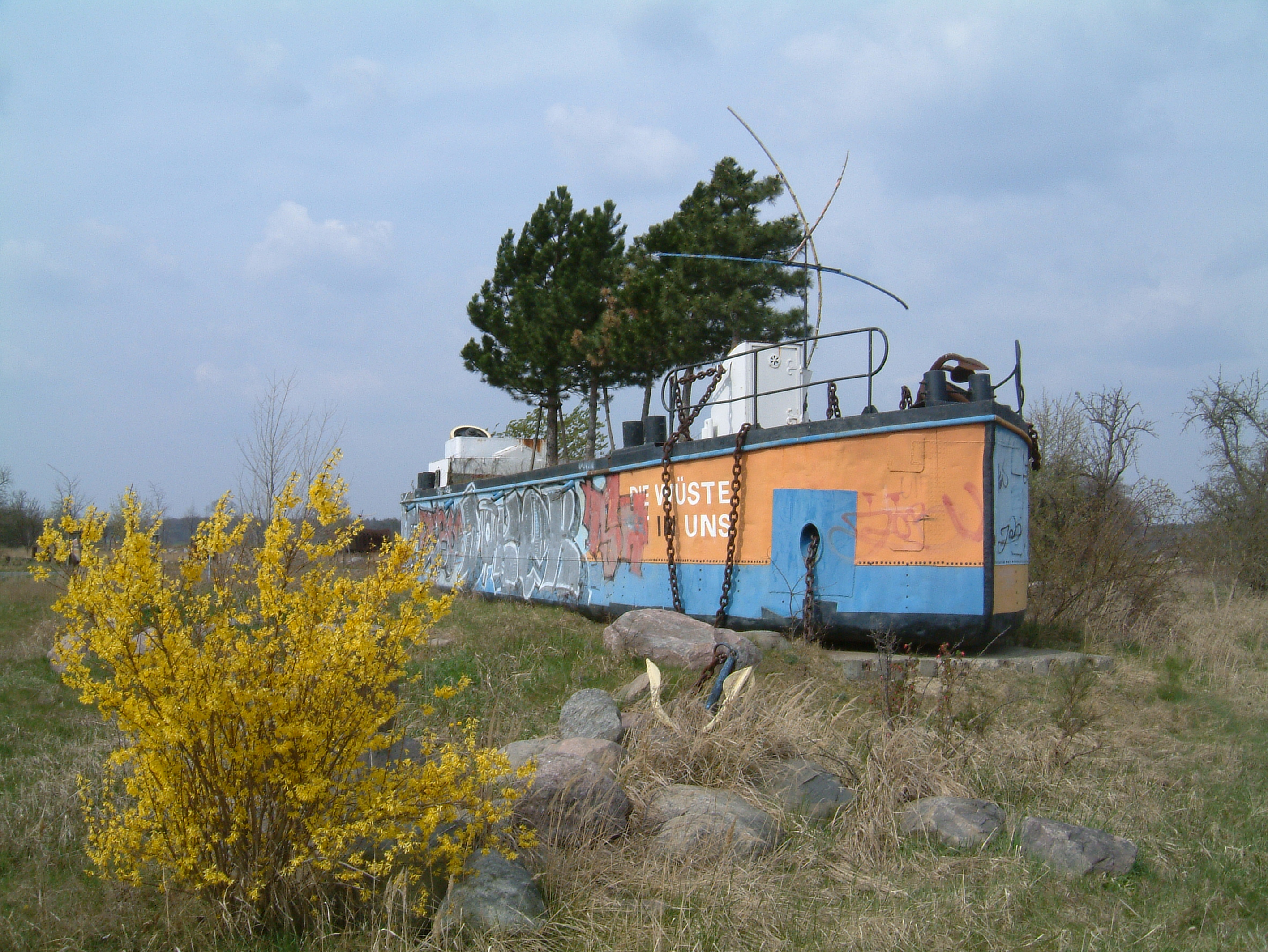 Projekt_Ben_Wagin_am_Gräbendorfer_See